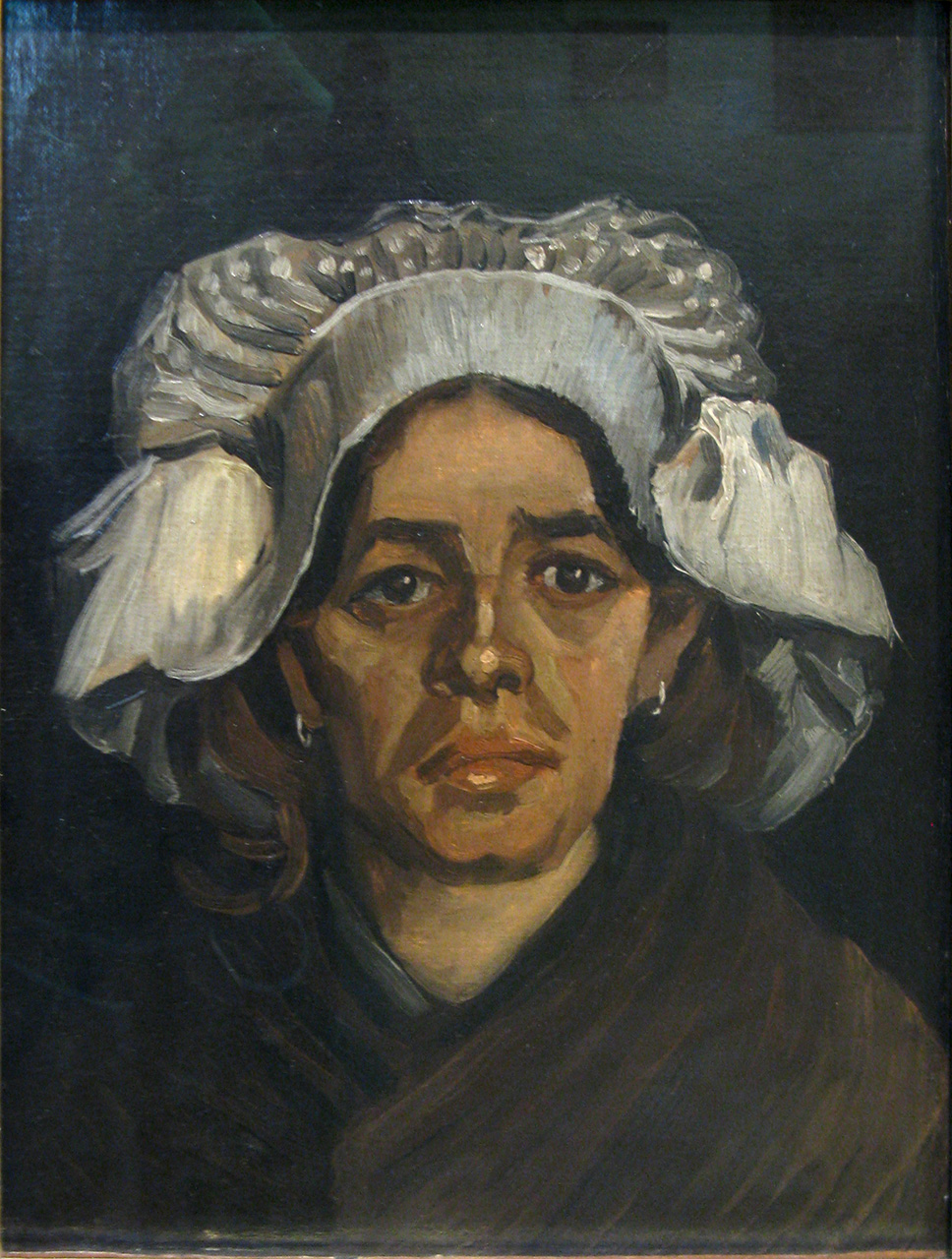 Painting, Oil on Canvas Nuenen, The Netherlands: March, 1885 Van Gogh Museum Amsterdam, The Netherlands, Europe F 130